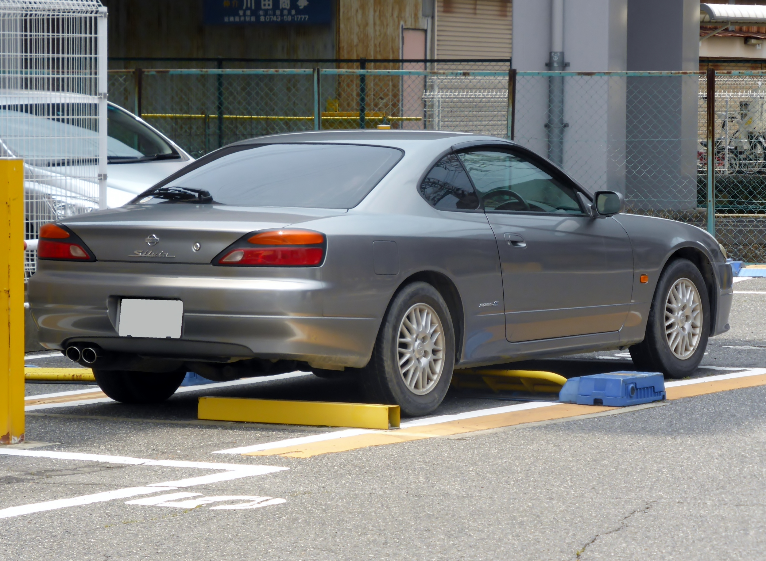 S15型日産・シルビアspec Sをリアから撮影。